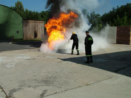 badania samochodów straży pożarnej